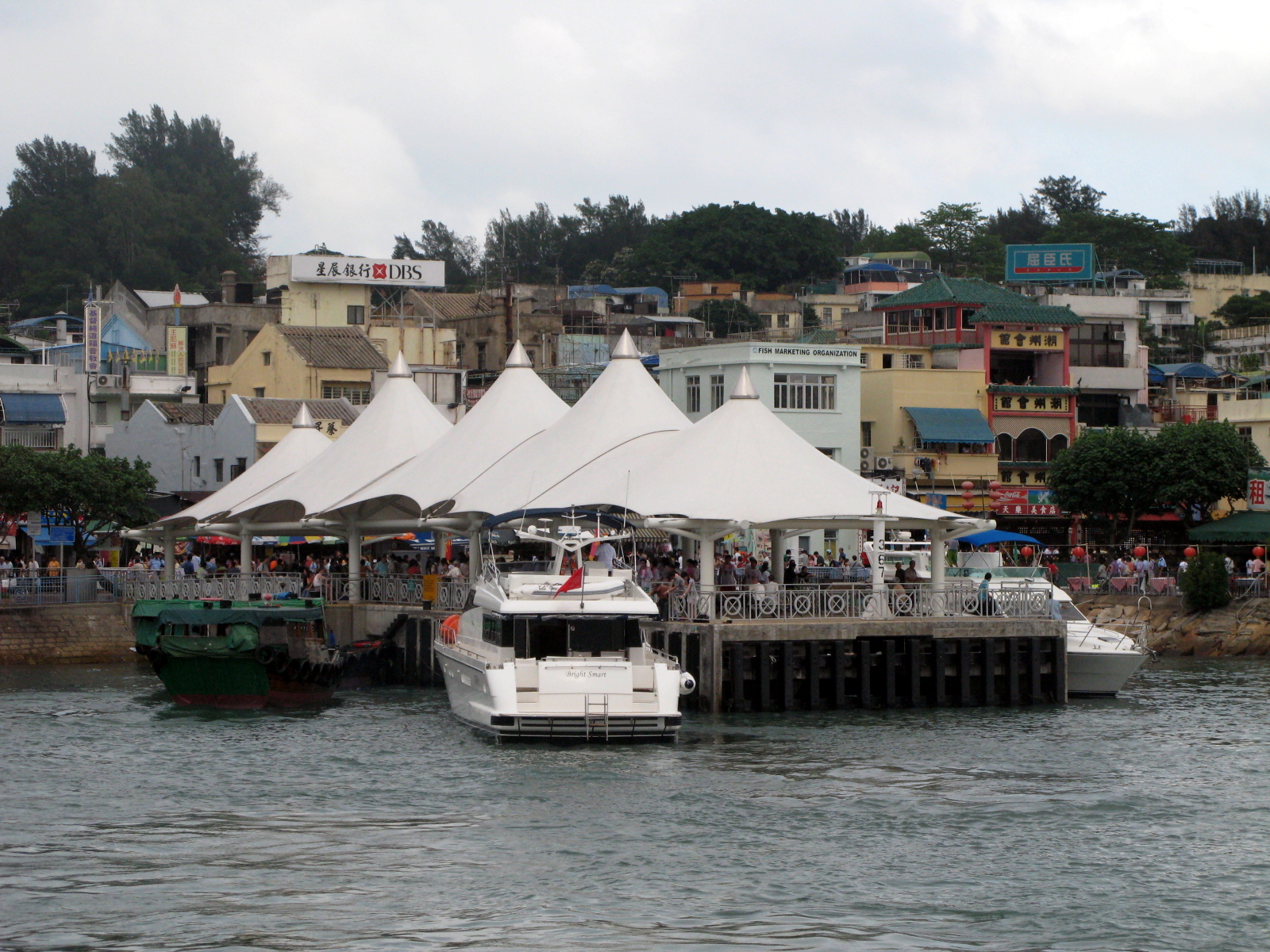 HK Cheung Chau Public Pier